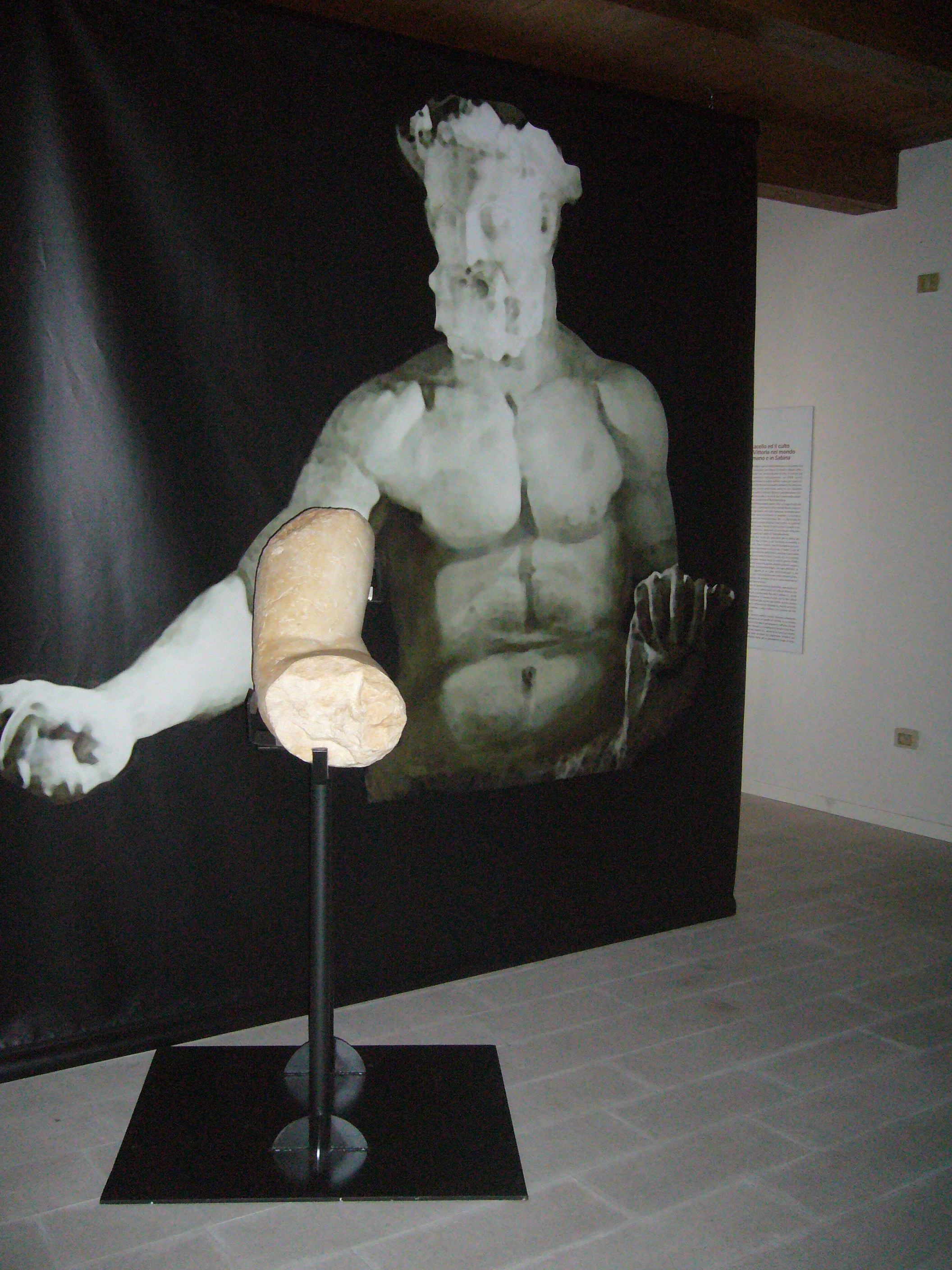 frammento di braccio di Ercole- Museo Palazzo Santi - Cascia